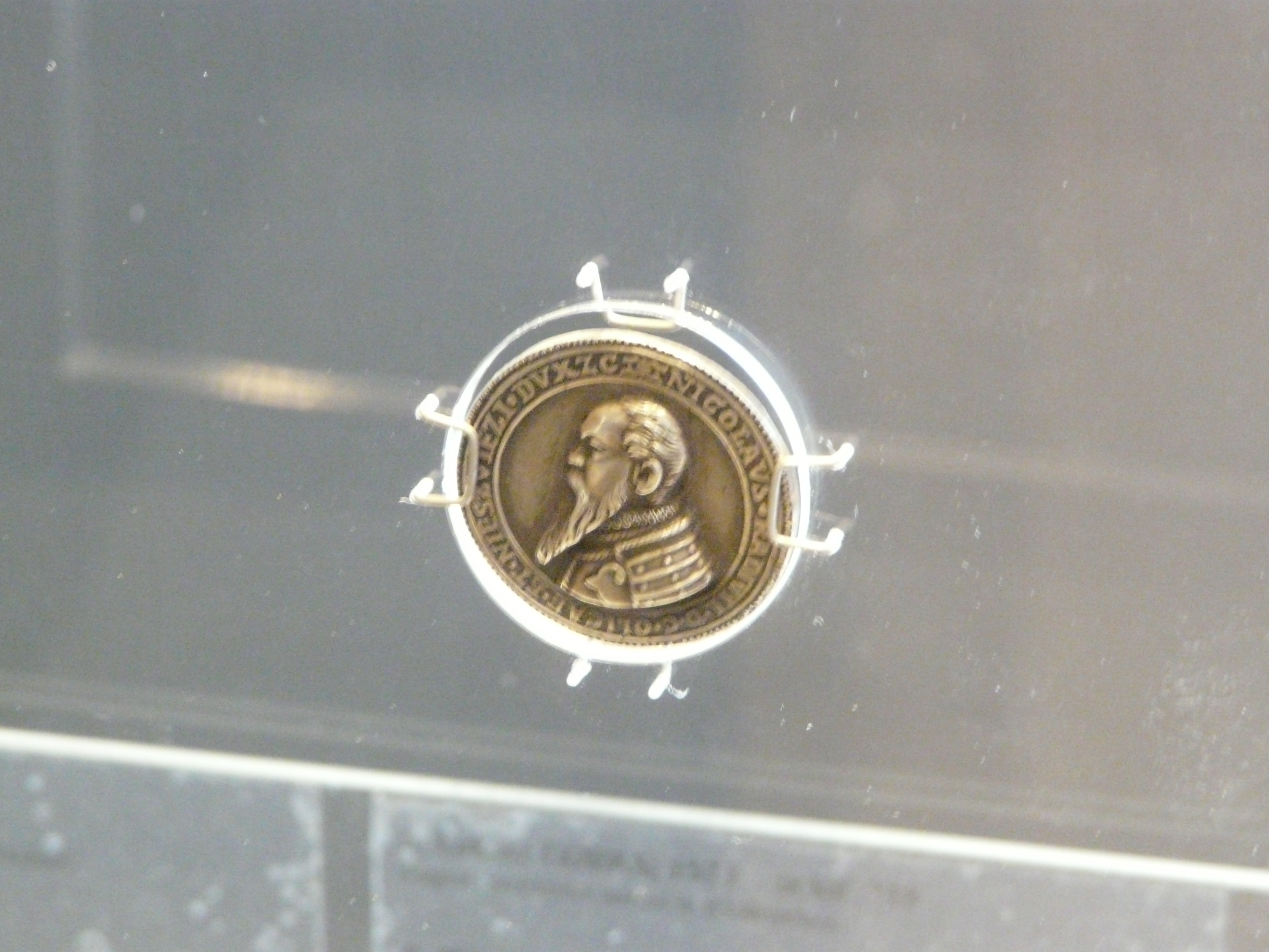 From the collection of the National Museum in Poznań. Mikołaj Radziwiłł "Czarny"